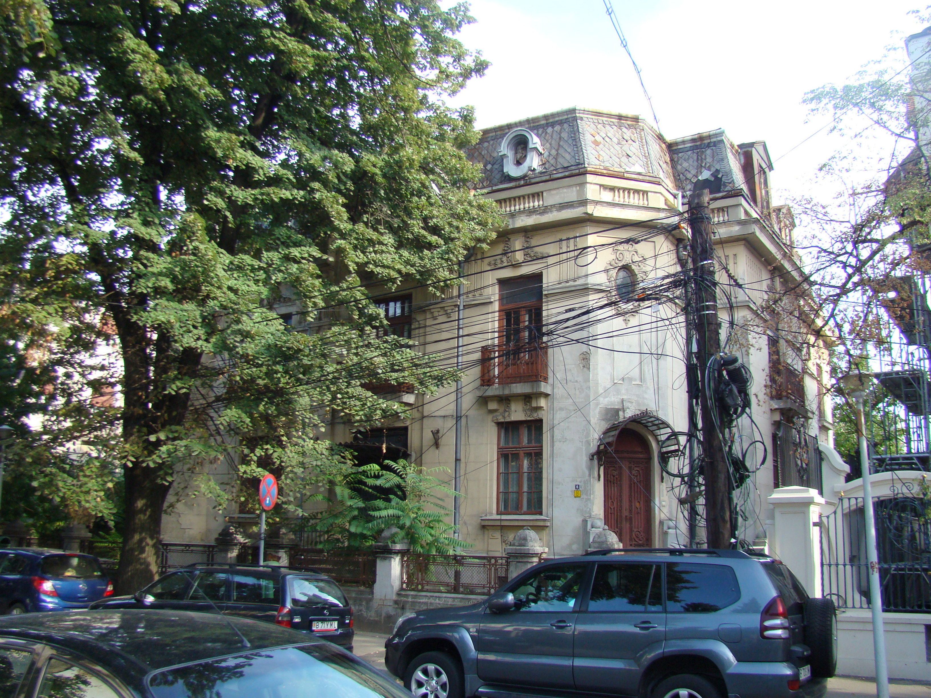 Casă monument istoric, str. Aleea Alexandru, nr.6